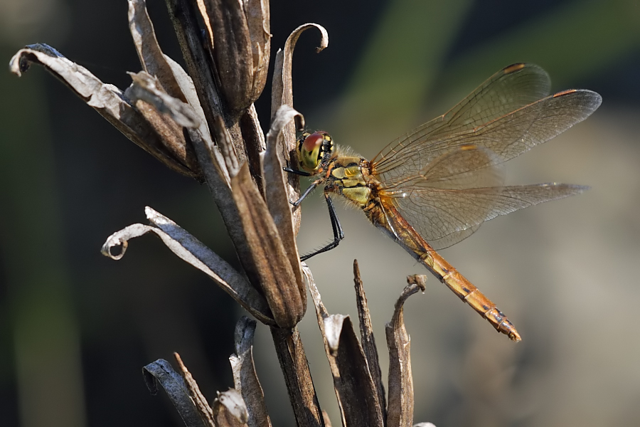 Sumpf-Heidelibelle - Sympetrum depressiusculum / female. Anmerkungen:Herbststurm in Brandenburg / Germany